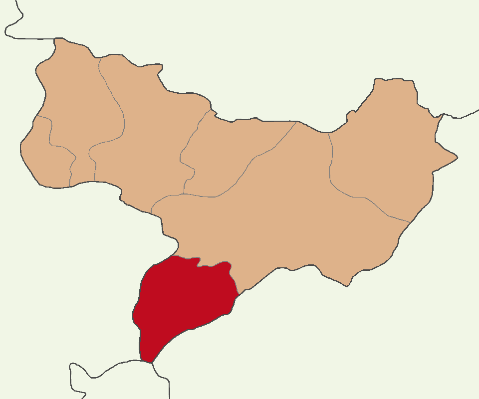 Göynücek ilçesinin konumu